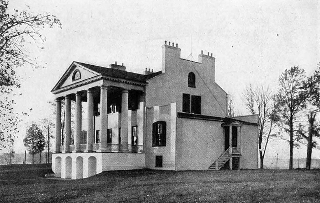 Oak Hill (James Monroe House), rear view.